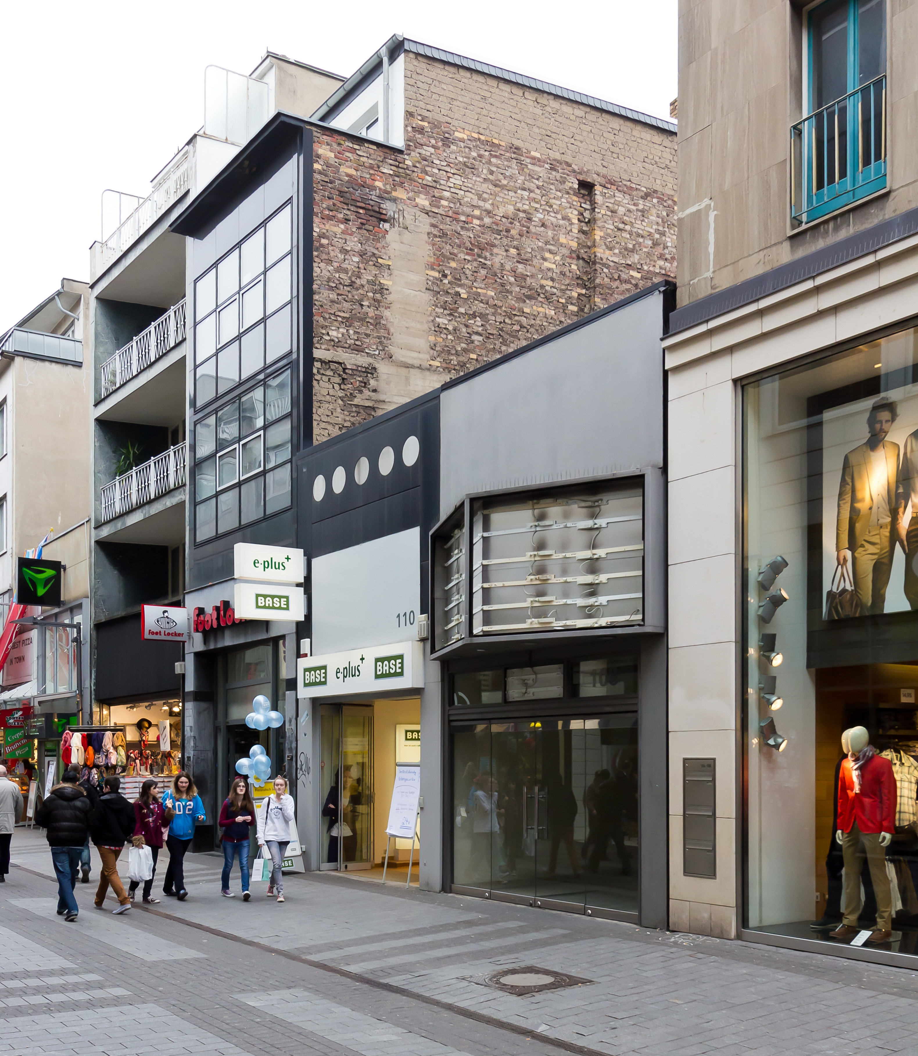 Minderbebauung auf der Hohe Straße 108-110 in Köln